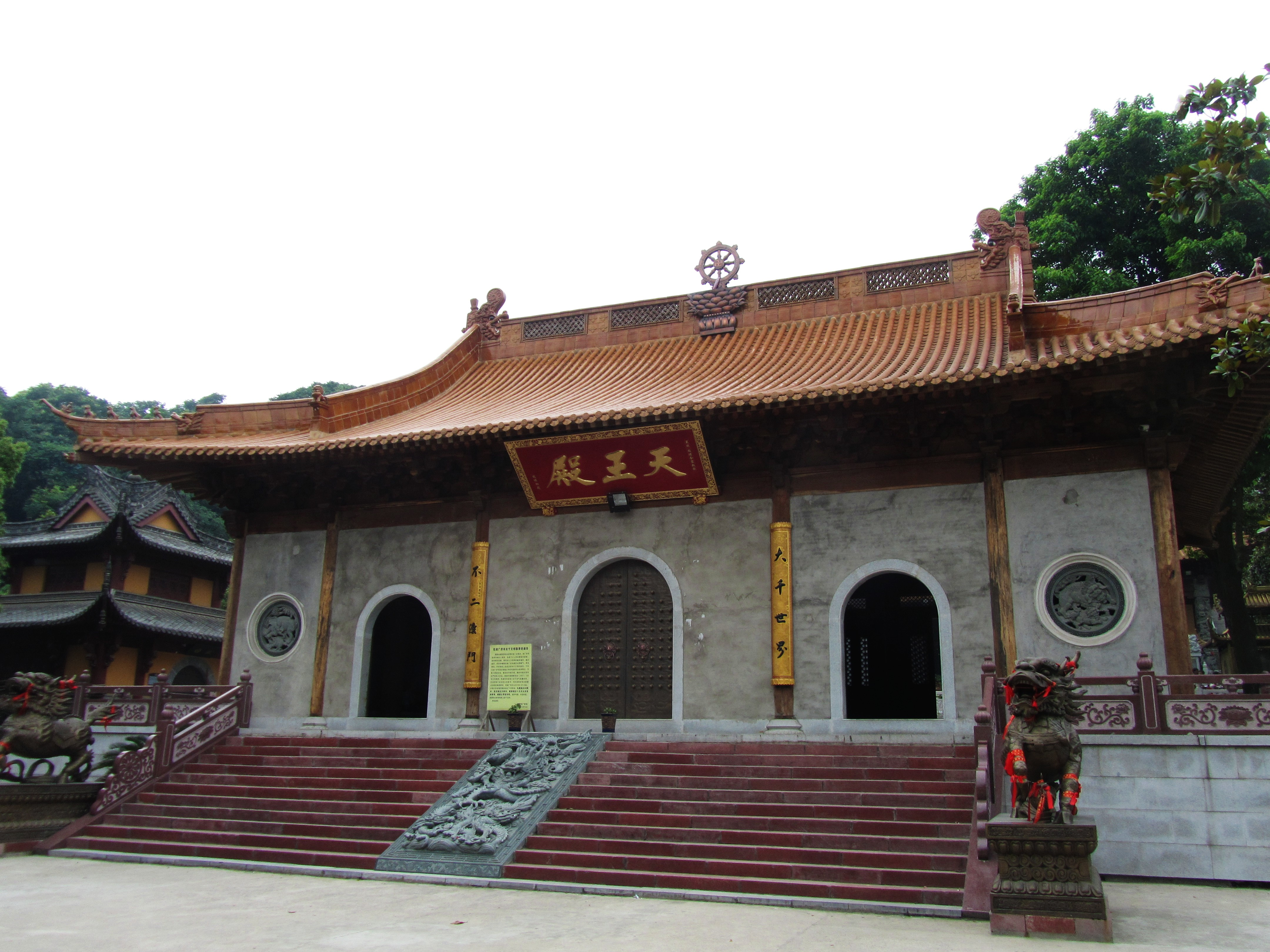 芜湖广济寺，天王殿。